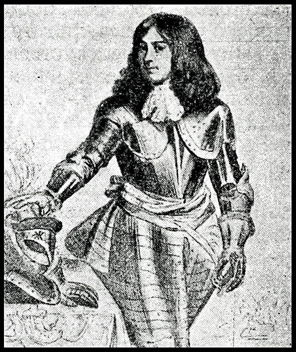 Это изображение было использовано для иллюстрирования статьи «Дон-Жуан Австрийский» опубликованной в девятом томе «Военной энциклопедии», который был издан книгоиздательским товариществом И. Д. Сытина в 1912 году в столице Российской империи городе Санкт-Петербурге.